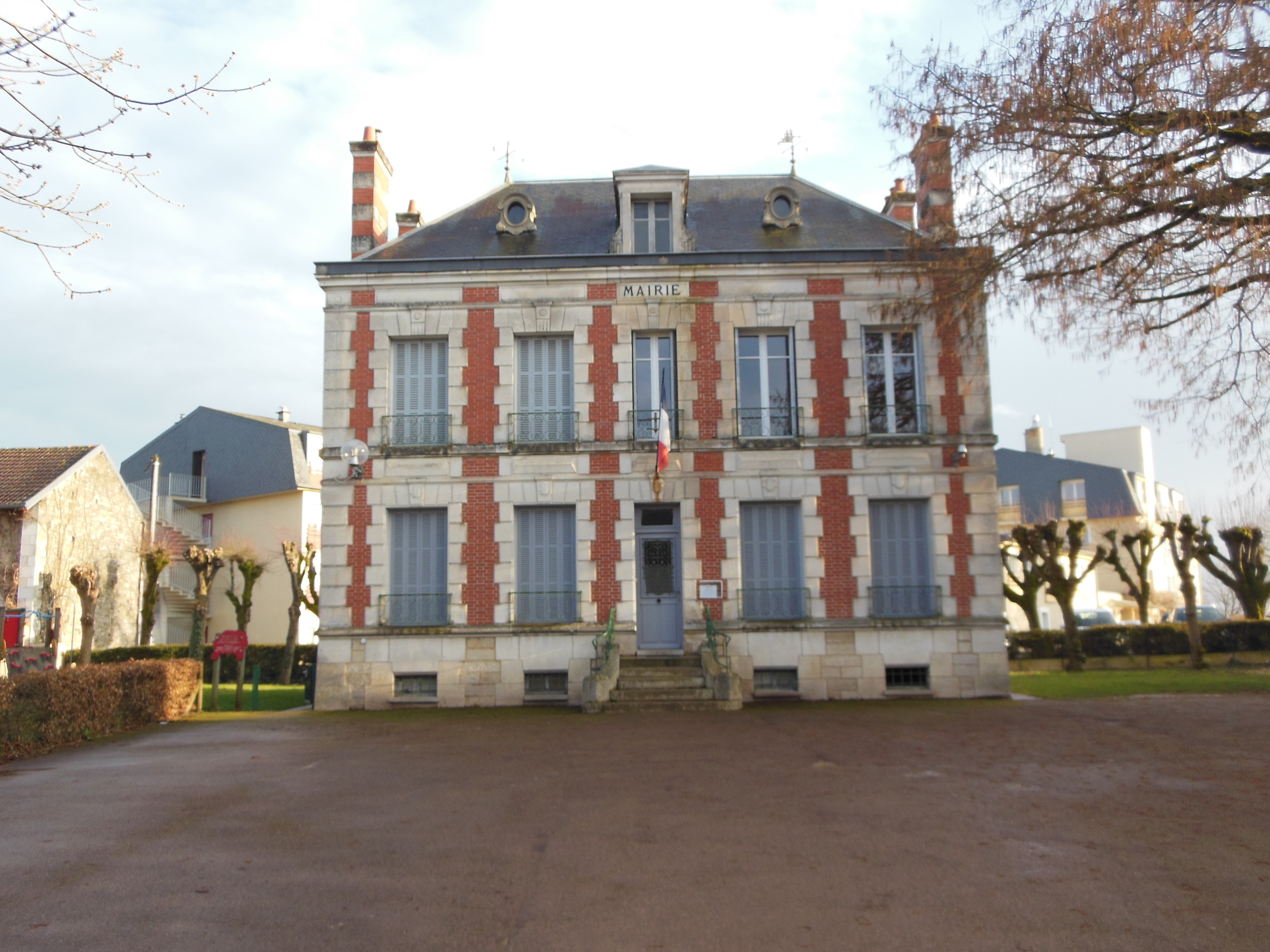 Mairie de Coulanges-la-Vineuse (Yonne).